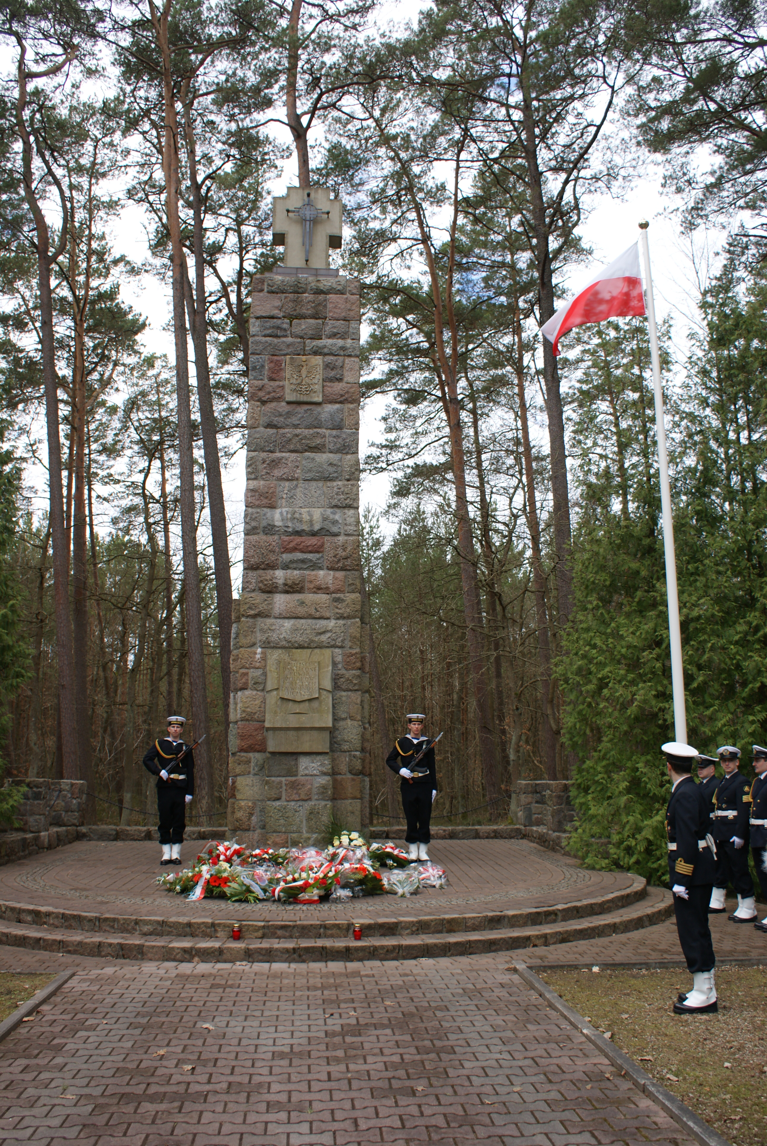 Pomnik Ofiar Piaśnicy z 1955, znajdujący się w lesie piaśnickim pod Wejherowem.